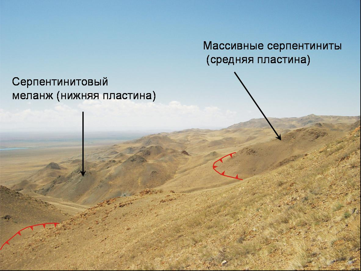 Агардакская офиолитовая зона